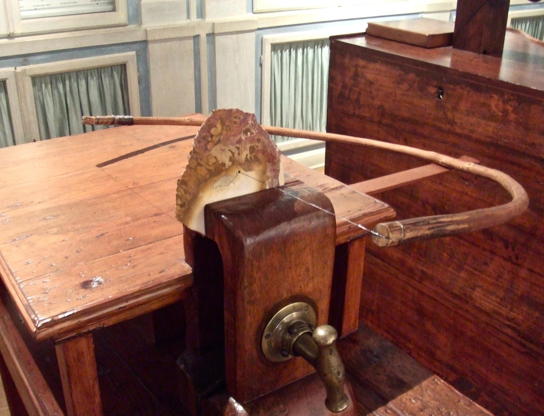 Banc de découpe au Musée de la Manufacture de pierres dures de Florence